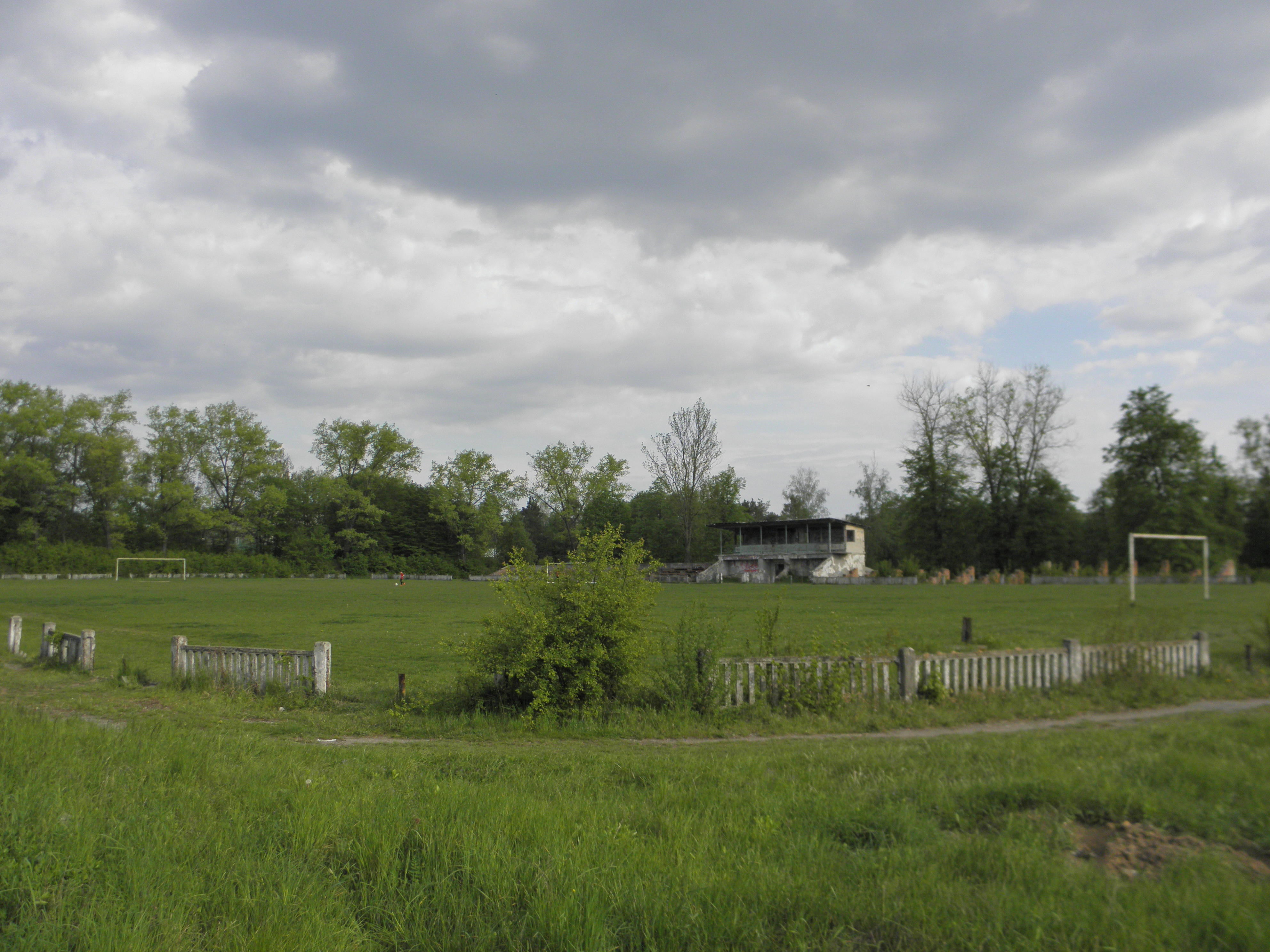 Старий Колос